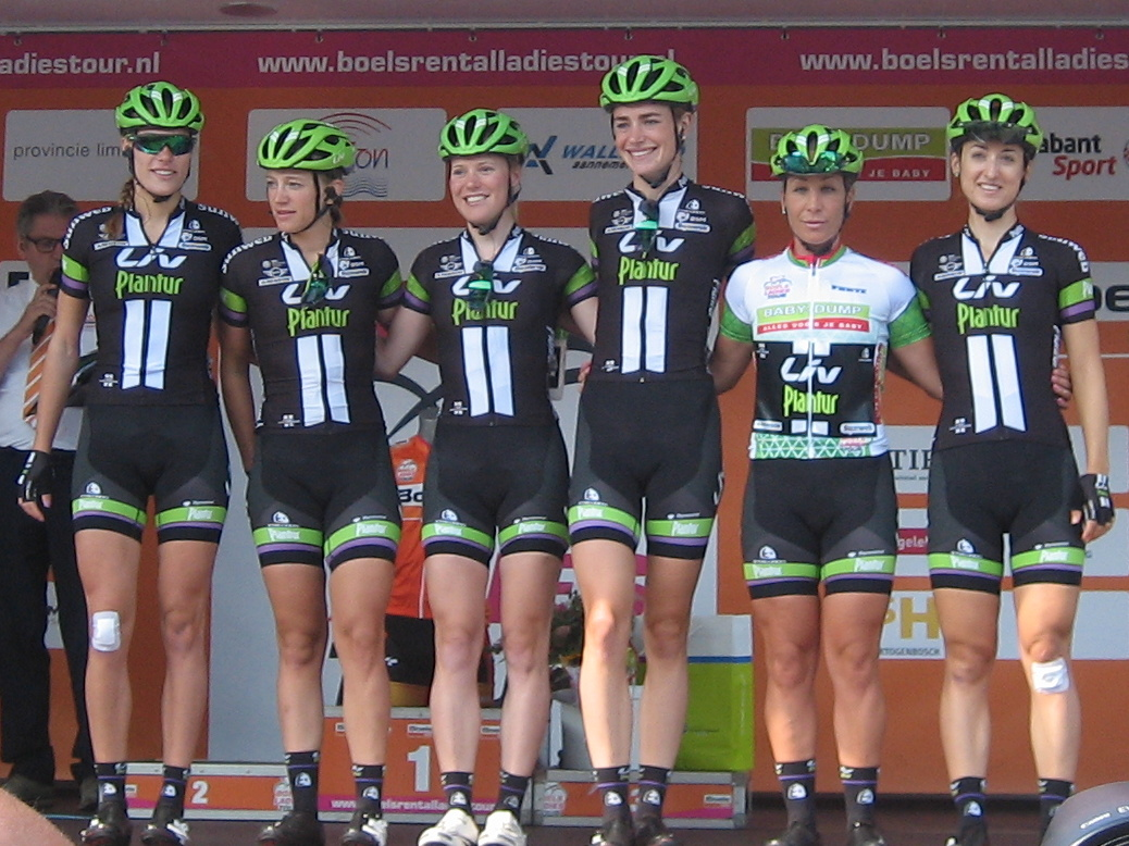 Team Liv-Plantur voor start 3e etappe Holland Ladies Tour 2016